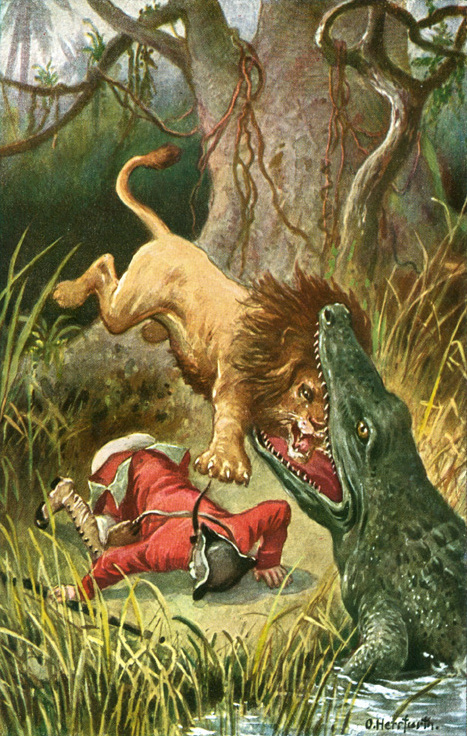 Münchhausens Abenteuer. Postkartenserie nach den Lügengeschichten des Baron Münchhausen. Serie der Firma UVACHROM (Verlag Farbenphotographische Gesellschaft m.b.H., Stuttgart) in zwei Folgen von je sechs Postkarten. Folge I: Serie 324. Nr. 4912–4917. Folge II: Unknown Text der Rückseite: Auf einer Seereise kam Münchhausen auf die Insel Ceylon. Am Ufer eines reißenden Stromes wurde er von einem ungeheuren Löwen überrascht. Als er entfliehen wollte, bemerkte er vor sich ein Krokodil, das seinen Rachen aufsperrte, um ihn zu verschlingen. Vor Schrecken stürzte er wie betäubt zu Boden. Als er wieder aufschaute, war der Löwe, der auf Münchhausen losstürzte, in den Rachen des Ungeheuers gesprungen. Nun konnte Münchhausen beide erlegen.